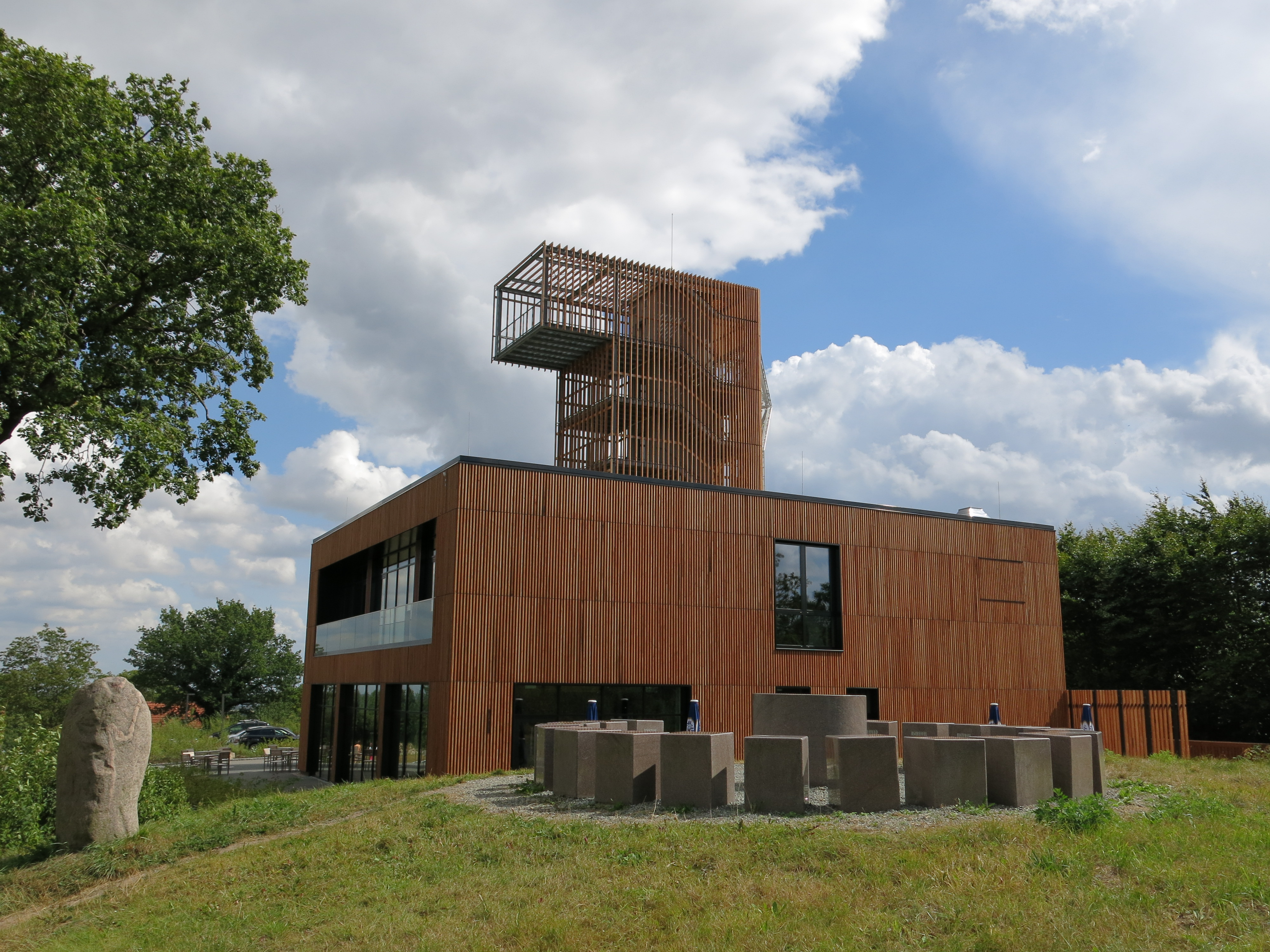 Der Aussichsturm auf dem Aschberg mit dem Gebäude der "Globetrotter-Lodge" und dem Steinkreis, der den Gipfelpunkt markiert.